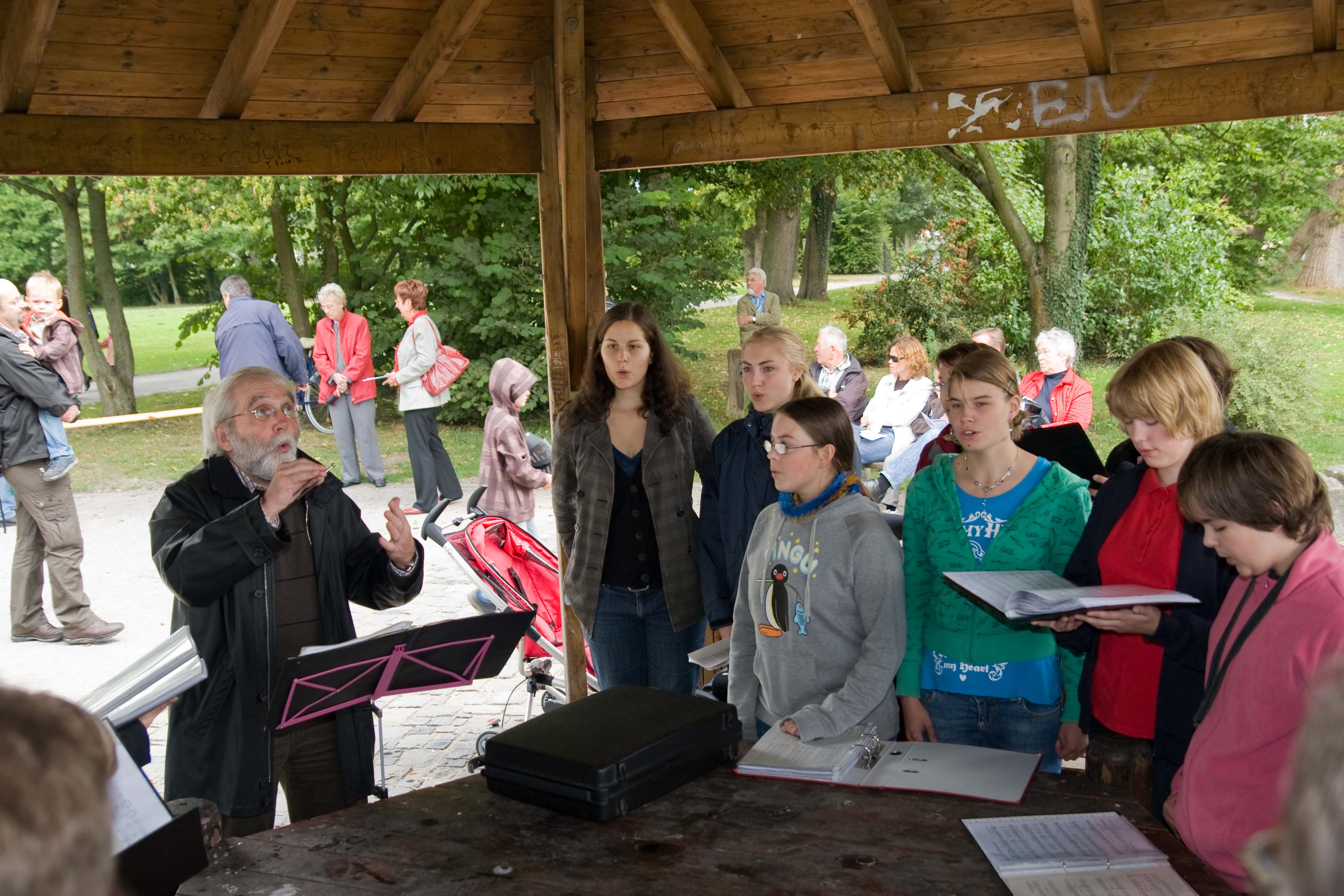 Das Foto zeigt den Chor "Cantate'86" bei der Gestaltung des Tages des offenen Denkmals am 14. September 2009 auf dem Burghügel Mark in Hamm.